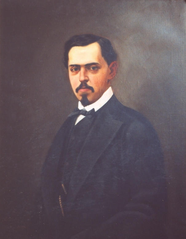 Retrato de Carlos de Borbón y Austria-Este